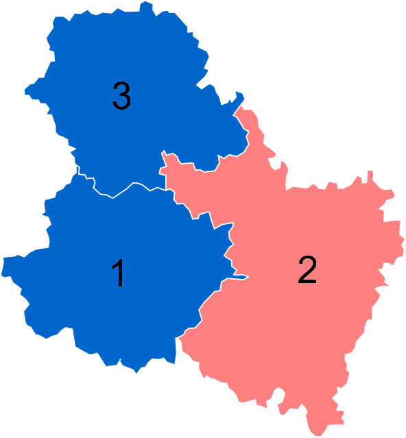 Résultats des élections législatives de l'Yonne en 2012